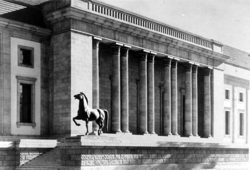 Information added by Wikimedia users.mit Teilansicht der zwei Bronzeplastiken "Schreitende Pferde" von Josef Thorak